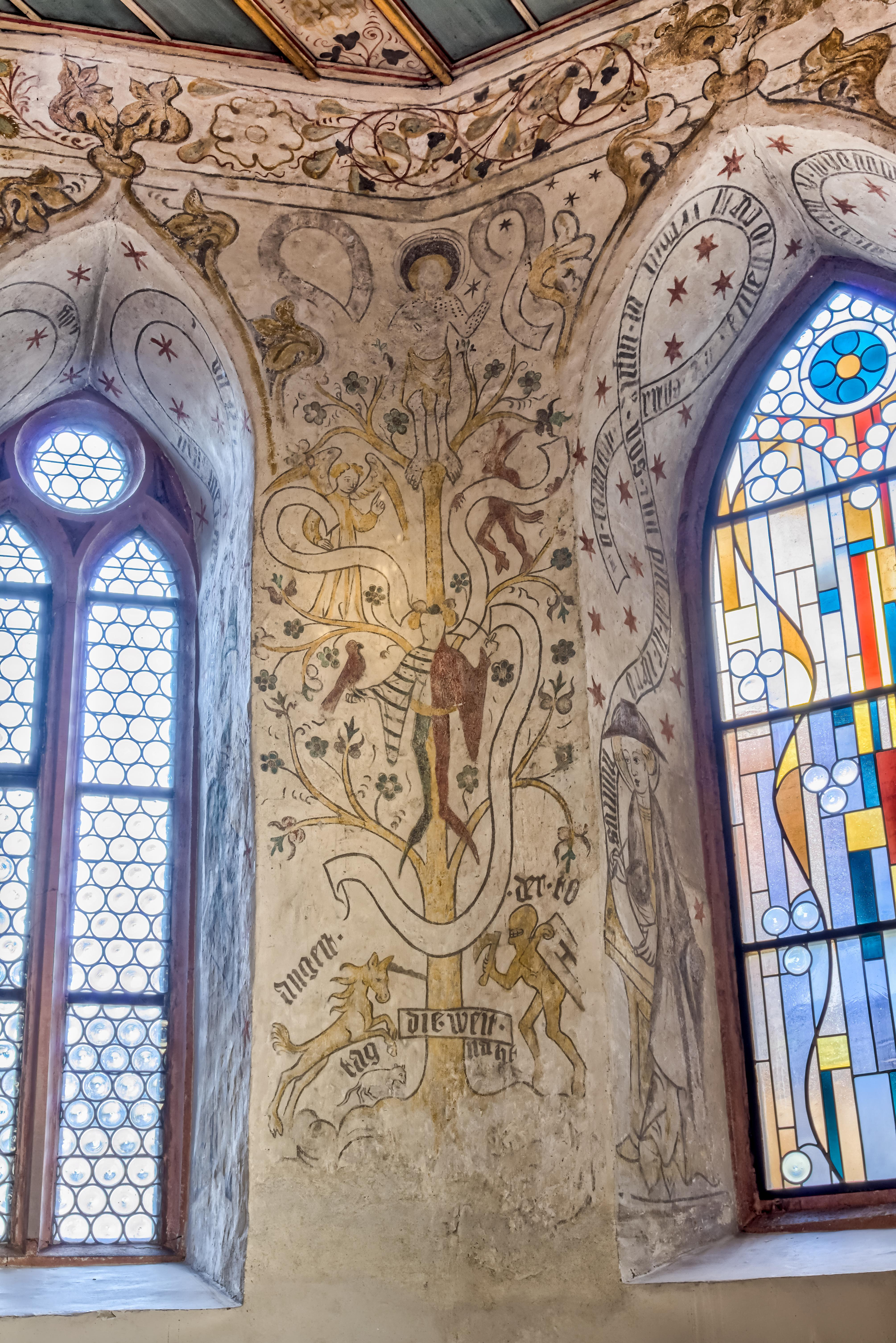 Bilder von St. Laurentius in Bischoffingen Zwischen Fenster 1 und 2 Der Lebensbaum